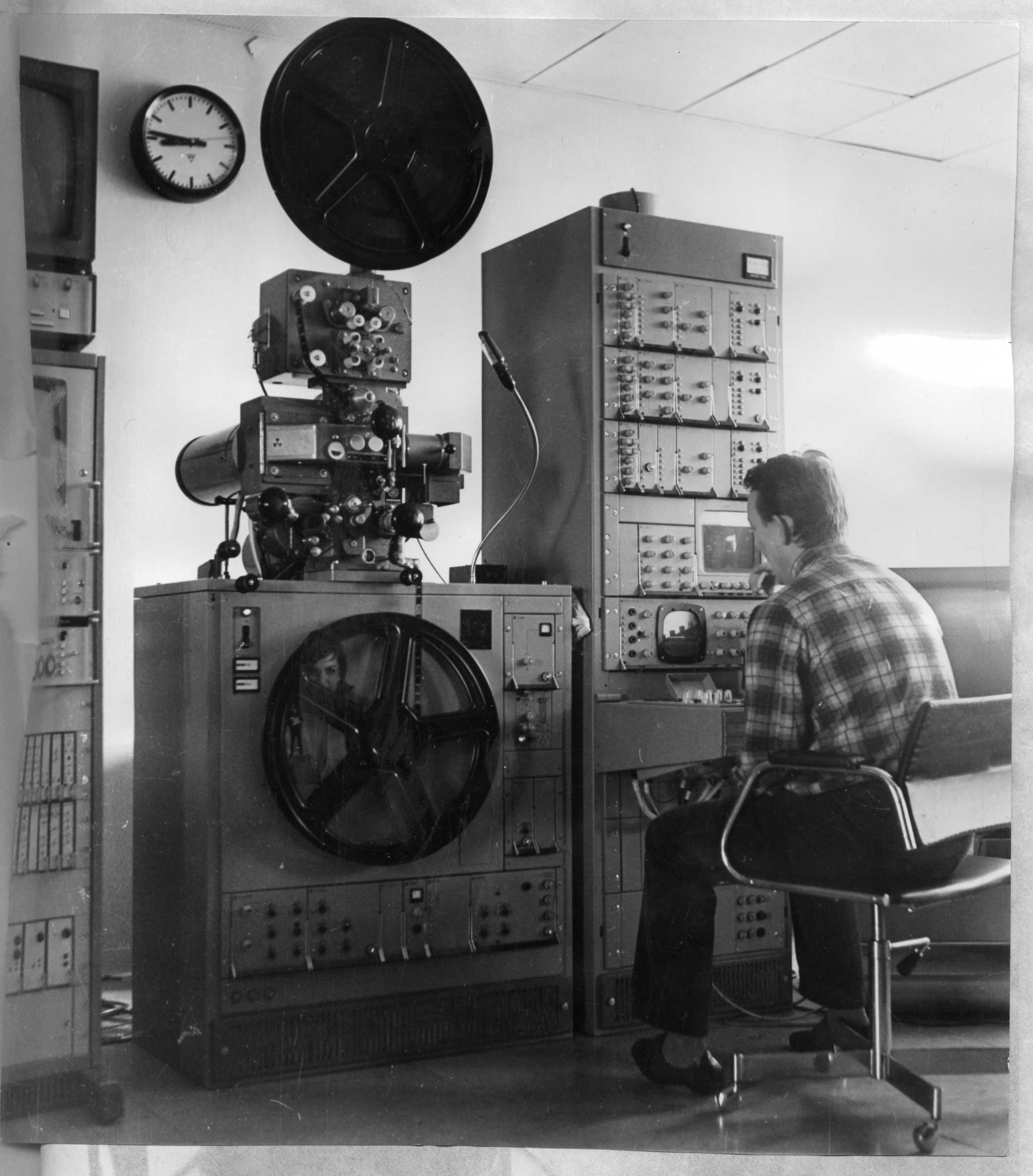 Barevná promítací aparatura, Československá televize, 1971.